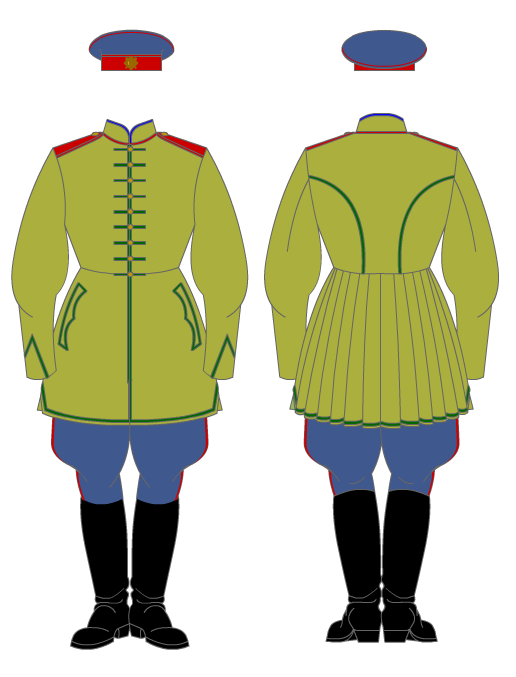 Проект сердюцької уніформи. Козацька